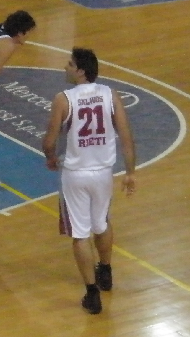 Vangelis Sklavos. inconteo sebastiani fortitudo.